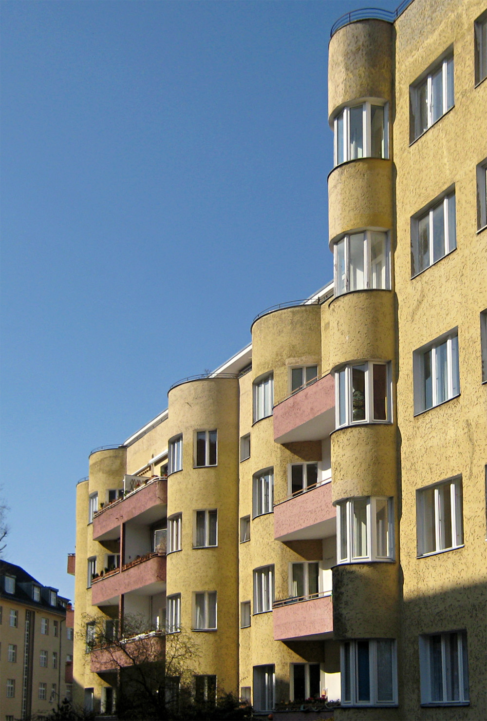 Bolivarallee 9